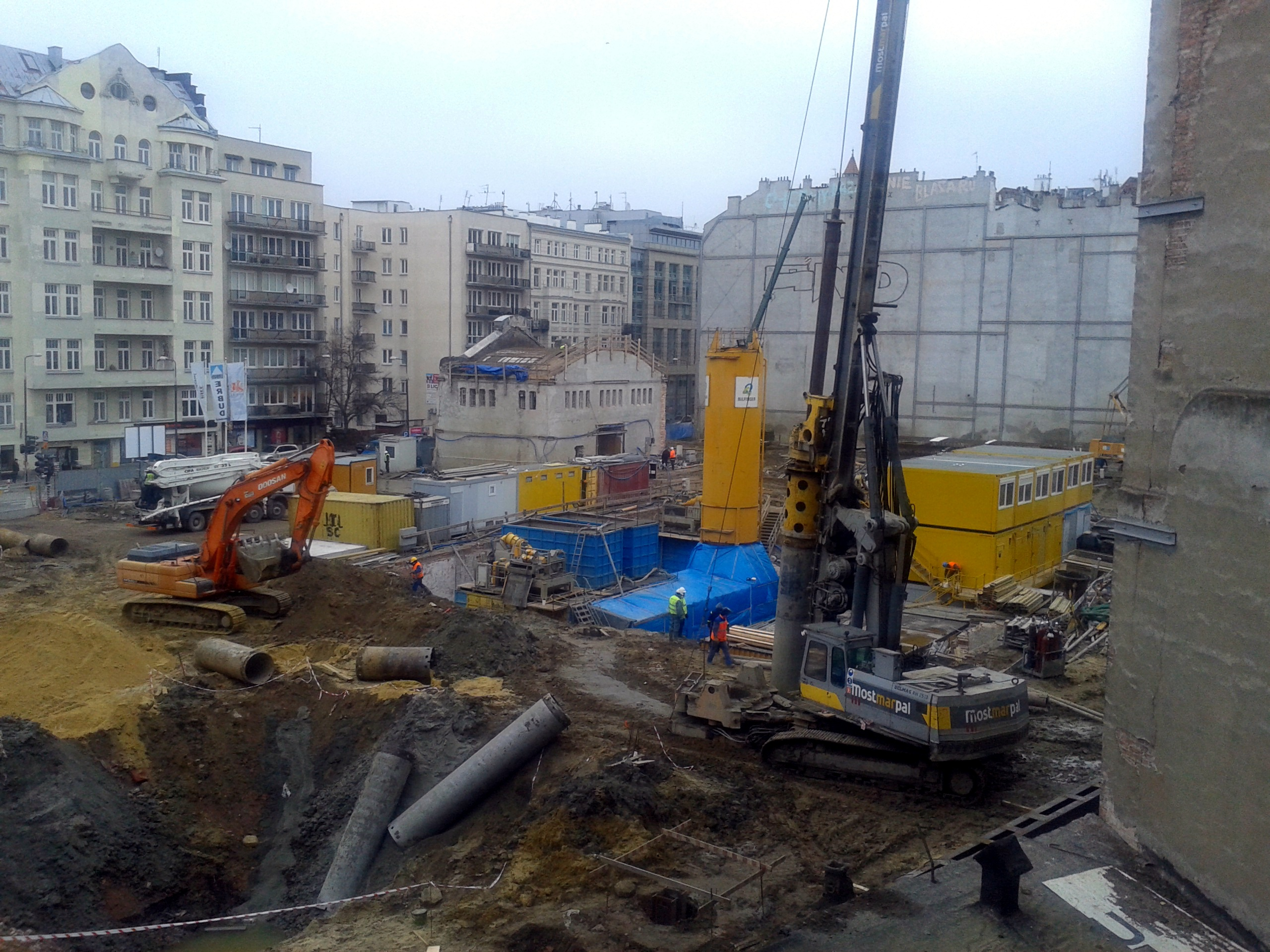 Hala na Koszykach w trakcie "remontu"